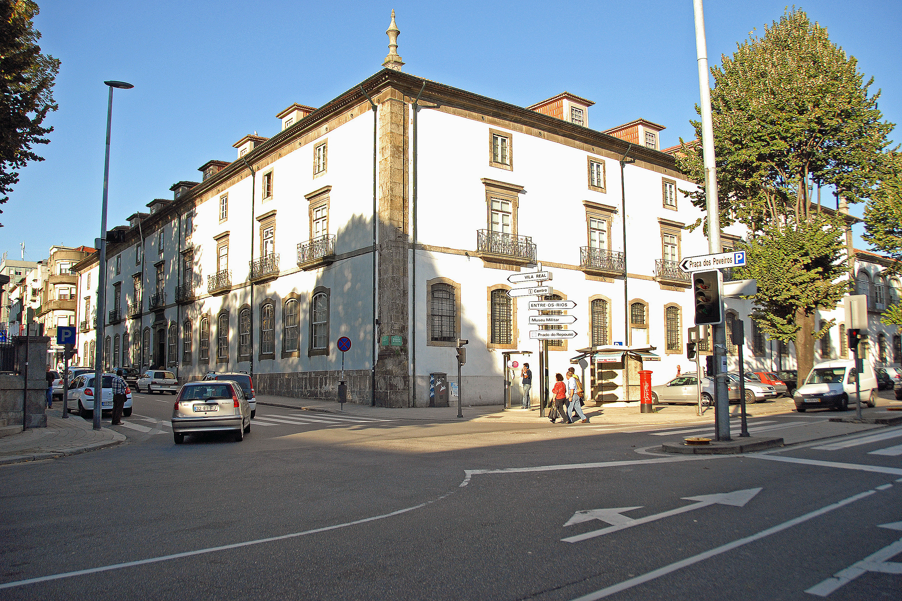 Edifício da Biblioteca Municipal do Porto ou Convento de Santo António da cidade This file was uploaded for Wiki Loves Monuments in Portugal with the unique identifier 73483.